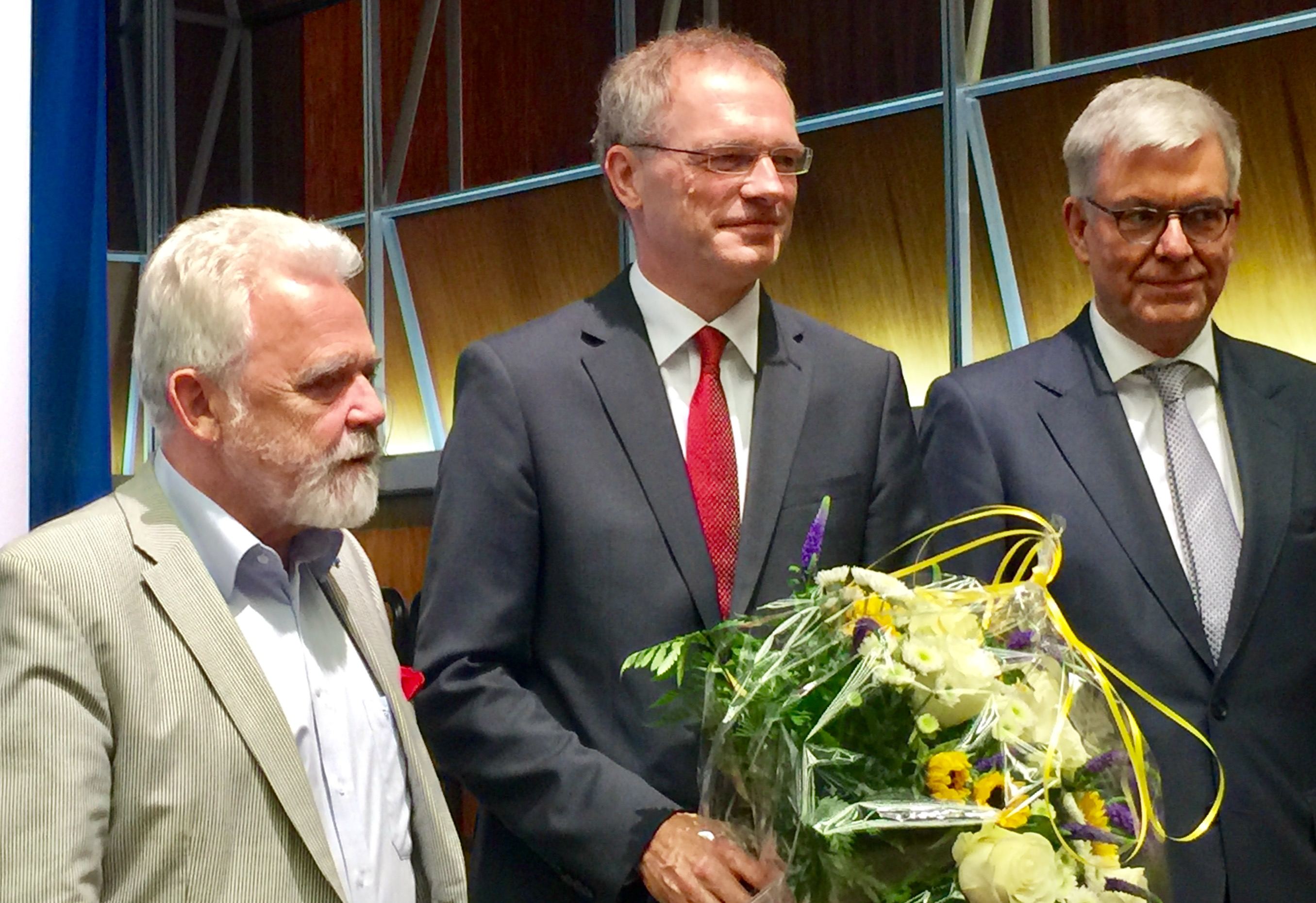 Wahl von Stefan Raue zum neuen Intendanten des Deutschlandradio. (von links): Willi Steul, Stefan Raue, Thomas Bellut (ZDF-Intendant und Vorsitzender des Deutschlandradio-Verwaltungsrats)